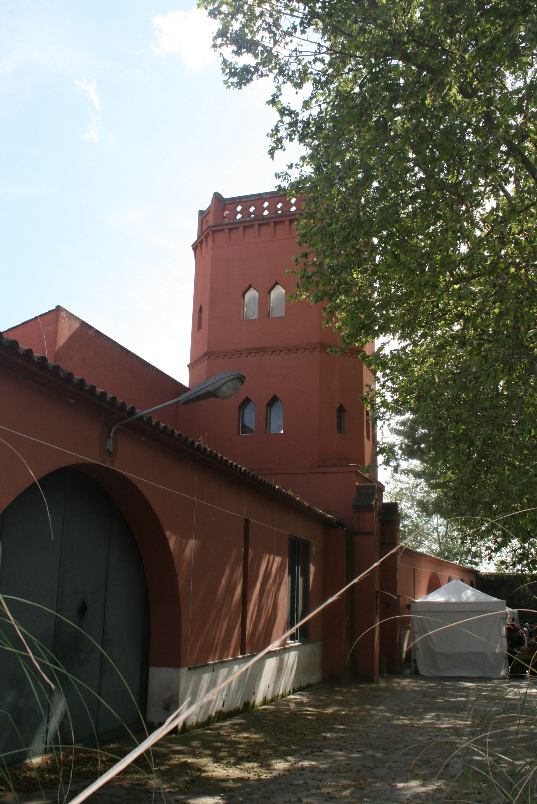 Torre del castell de Mogoda